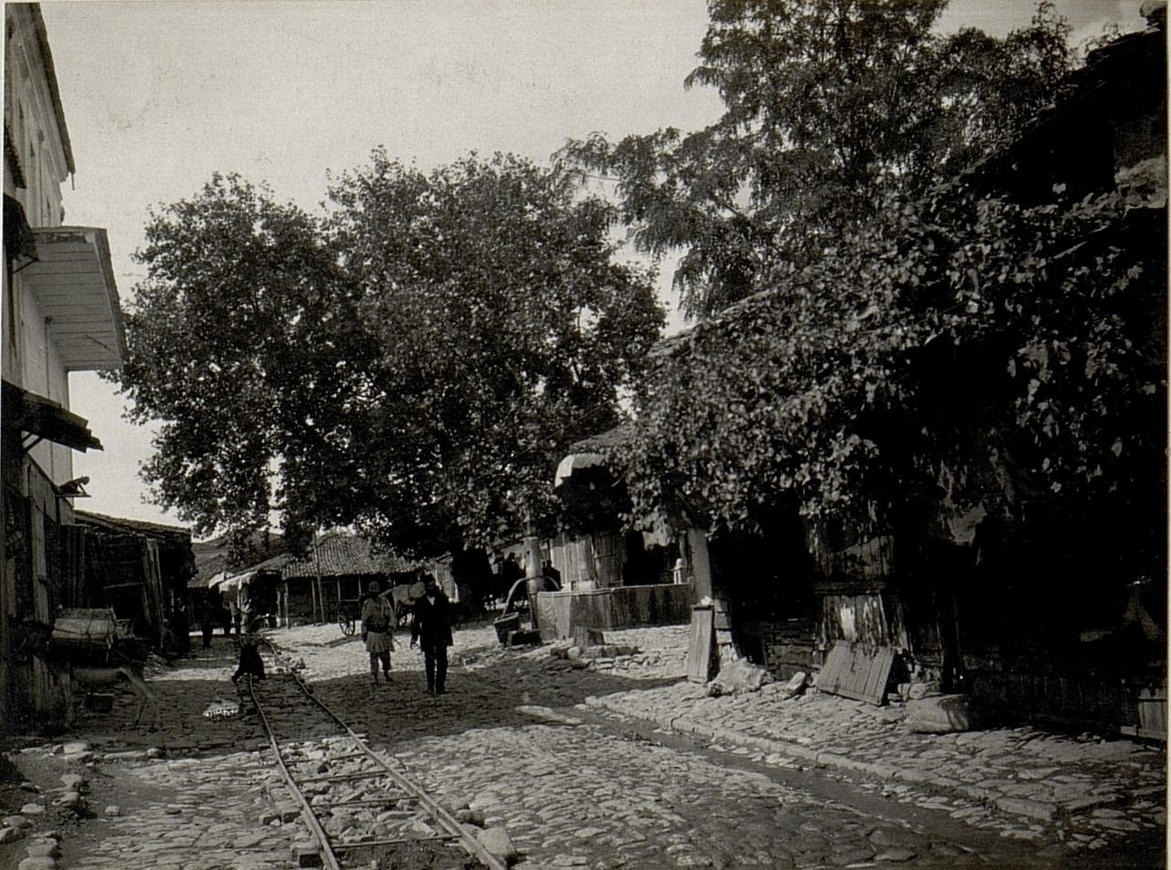 Elbassan: Ochridastrasse (nahe Stadttor.)